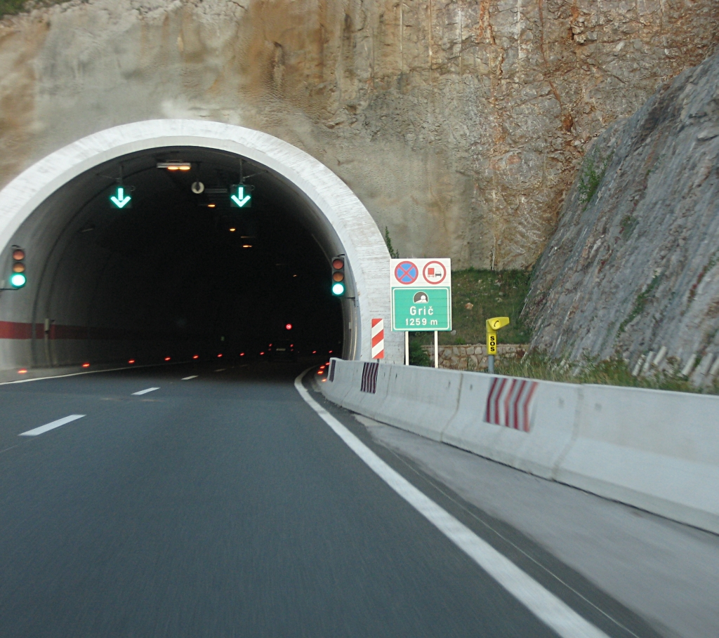 Tunel Grič, Autocesta_A1.